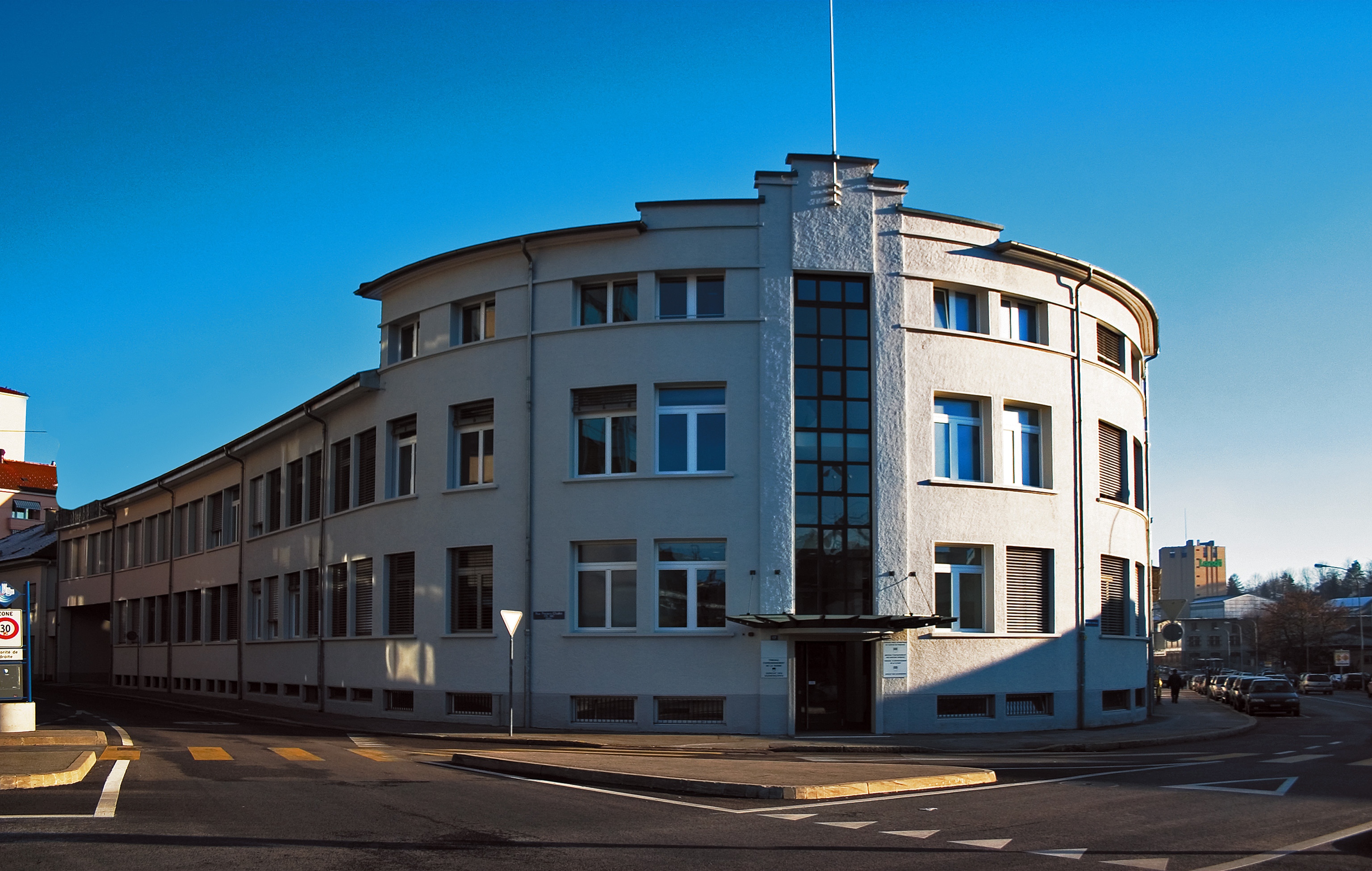 Bâtiment des Archives de l'Etat de Fribourg, Route des Arsenaux 17, Fribourg, Suisse